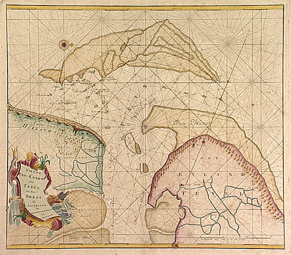 Nieuwe Pas-Kaart van Texel en den Horst